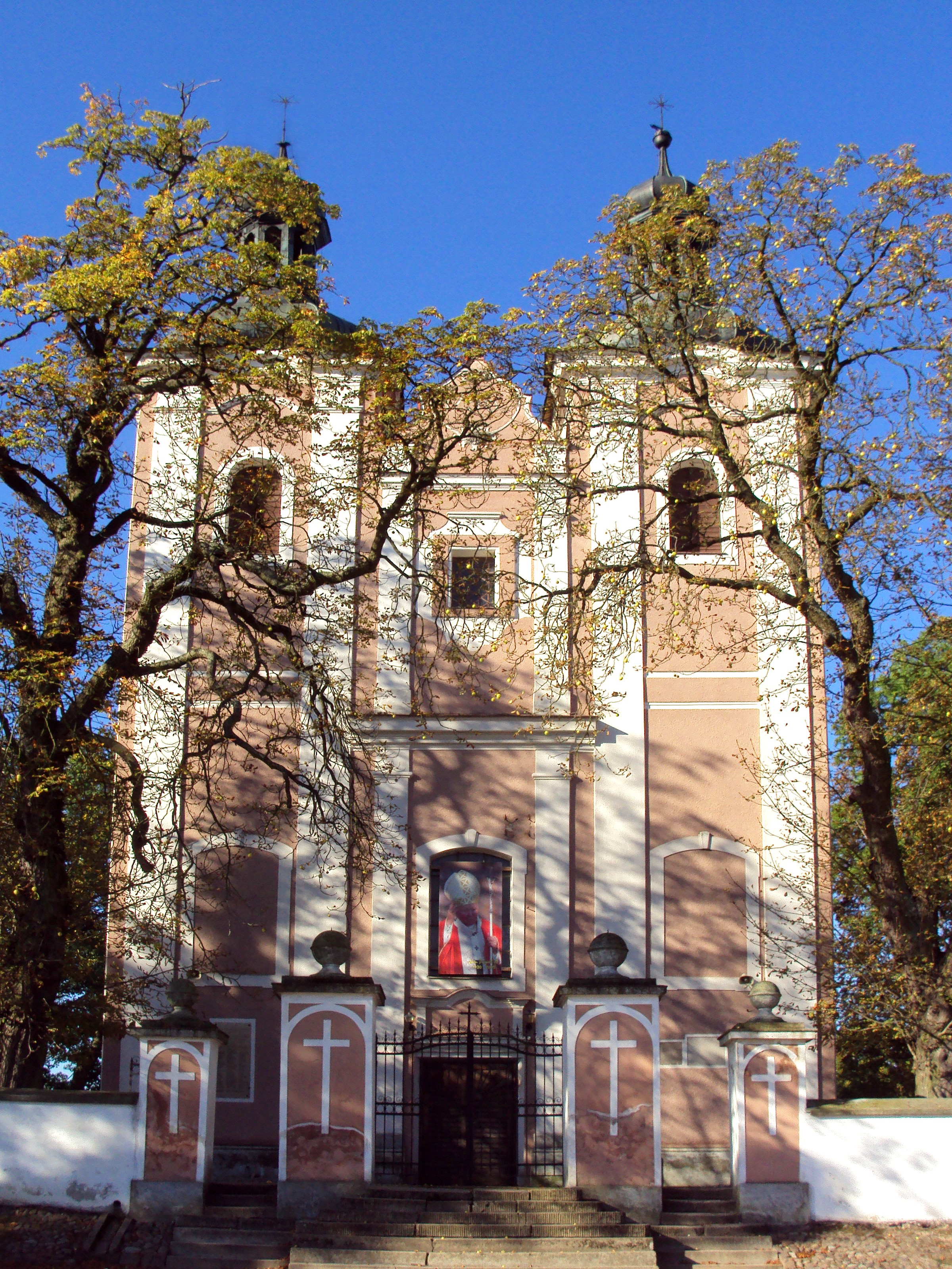 zespół kościoła par. p.w. św. Jana Chrzciciela: kościół, 1752-56 Sadłowo